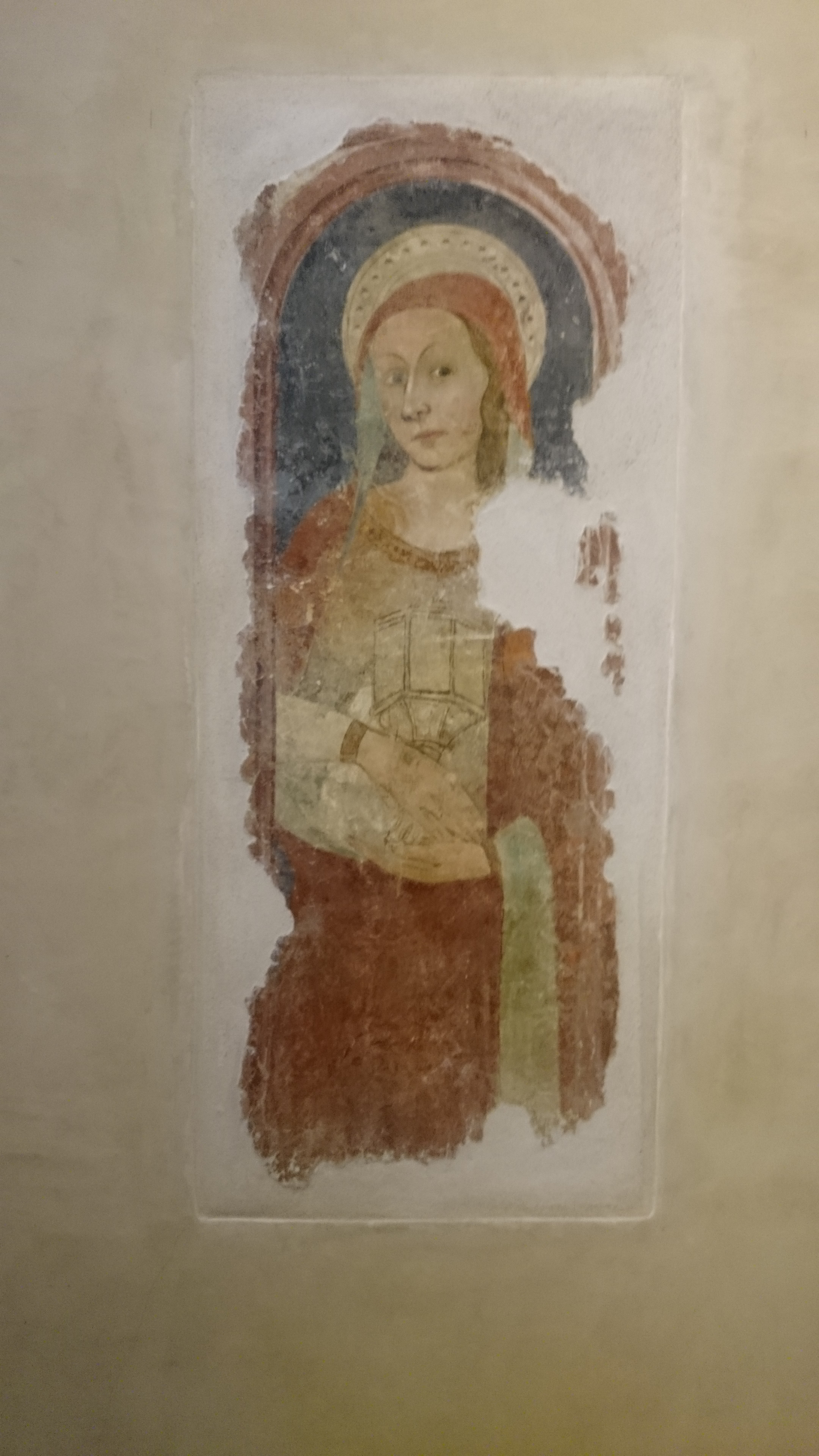 L'Aquila: Chiesa di Santa Maria del Ponte